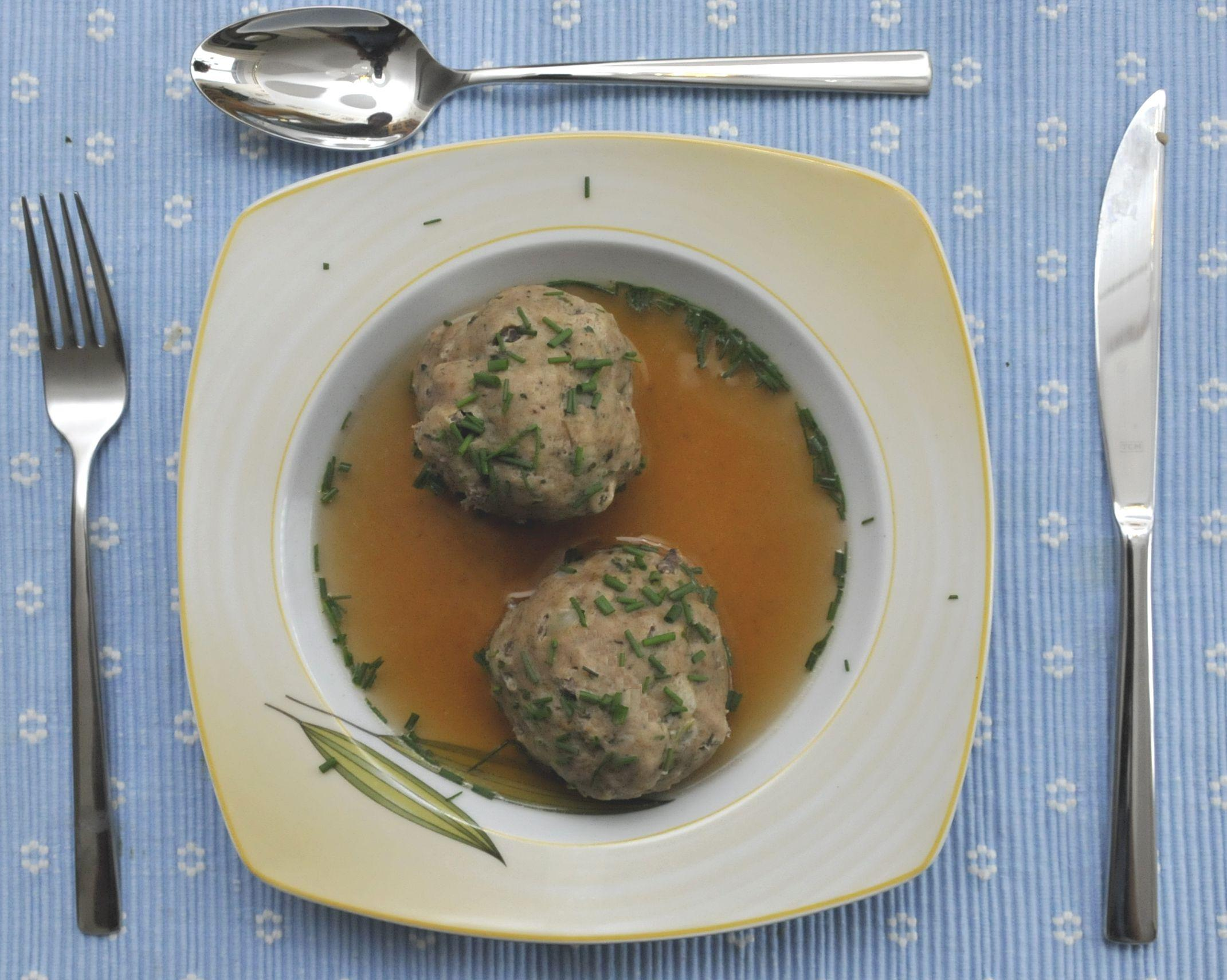 Leberknoedelsuppe